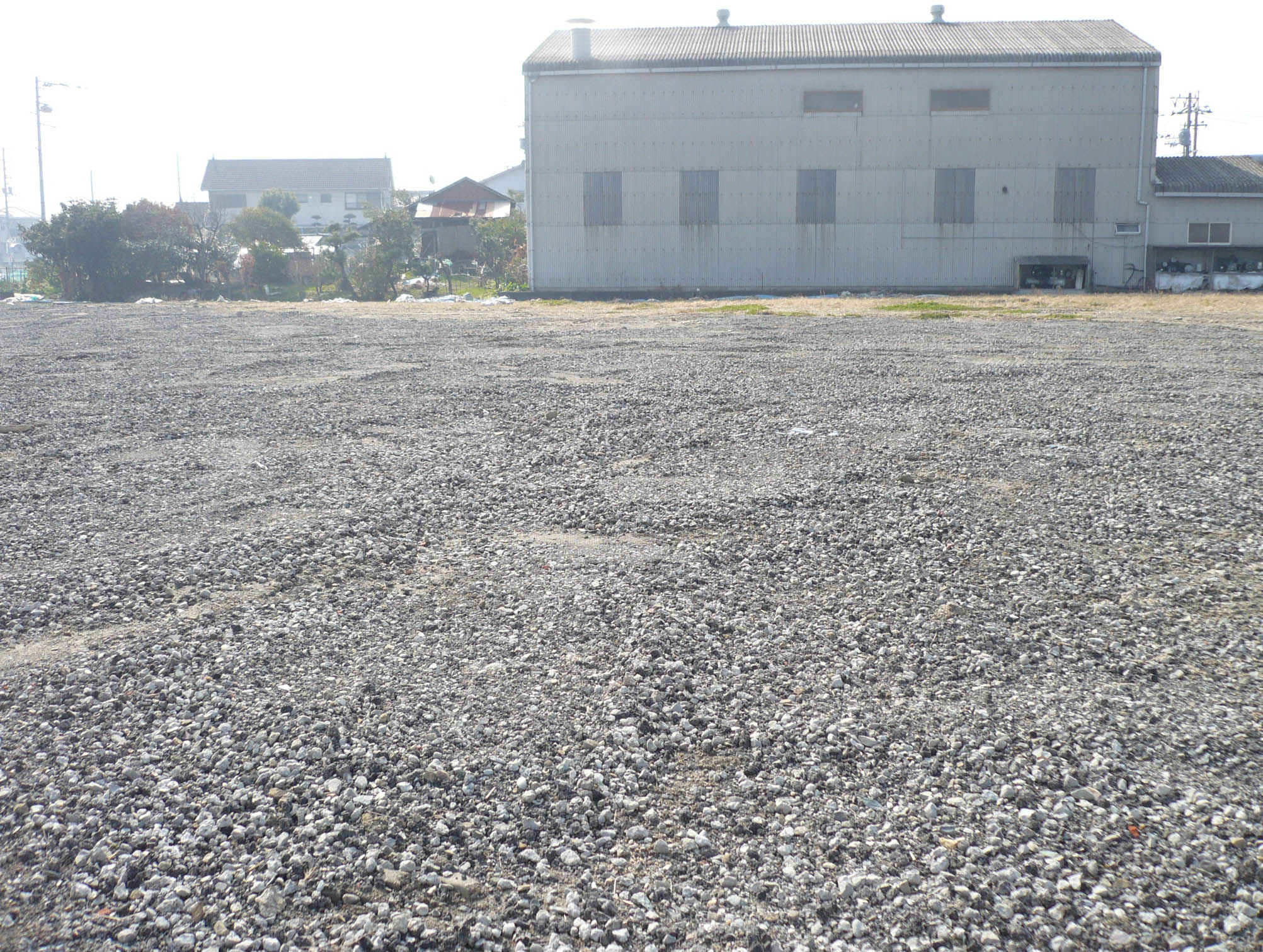 池庭跡